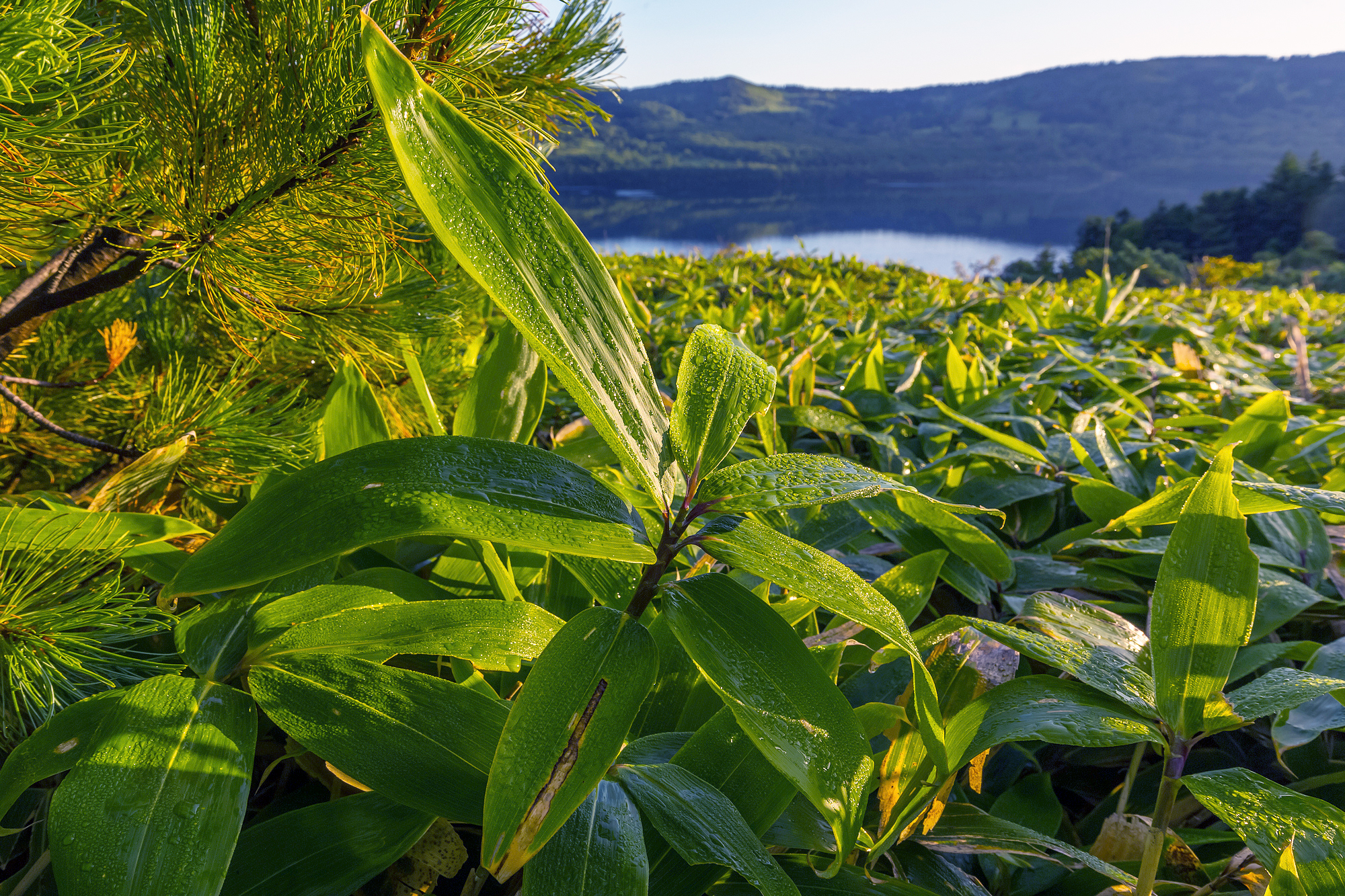 Курильский заповедник: Южно-Курильский городской округ, Сахалинская область This image is related to the protected area of Russia number 6500090